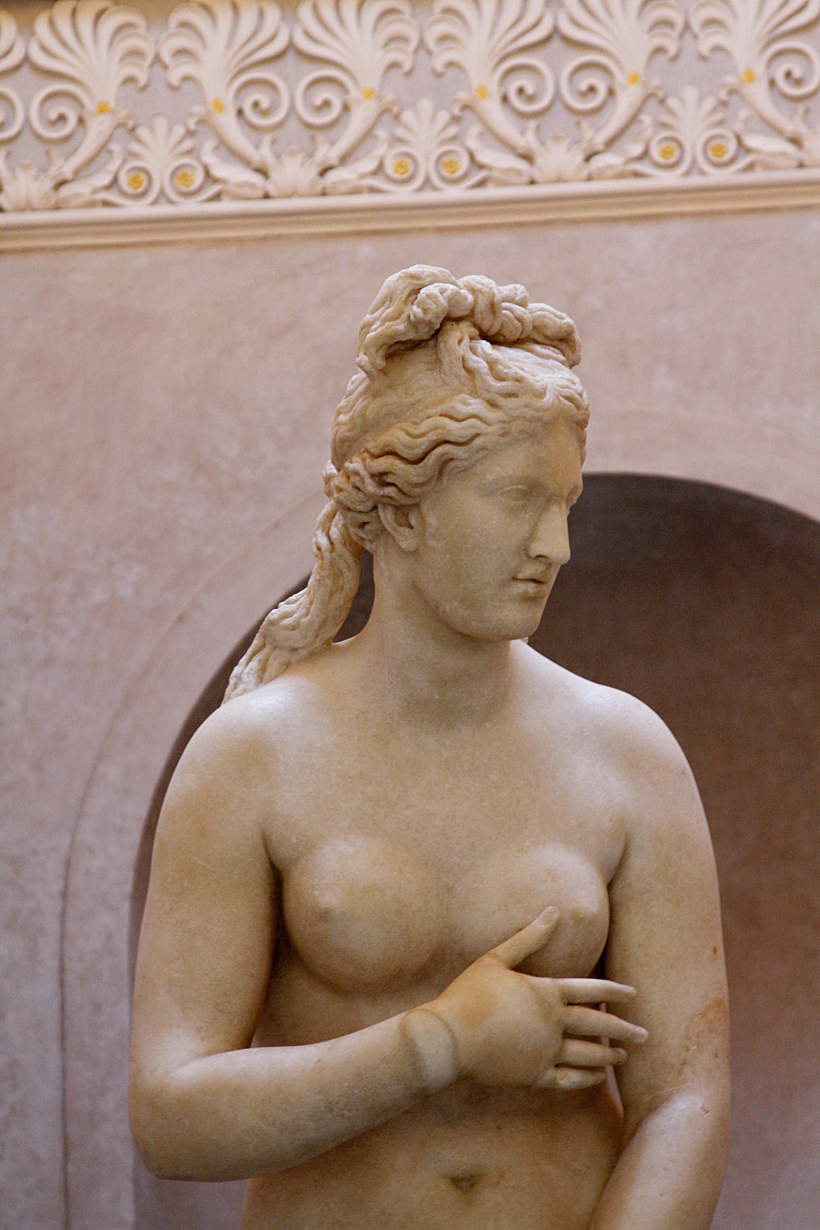 Palazzo Nuovo - Musei Capitolini - Rome